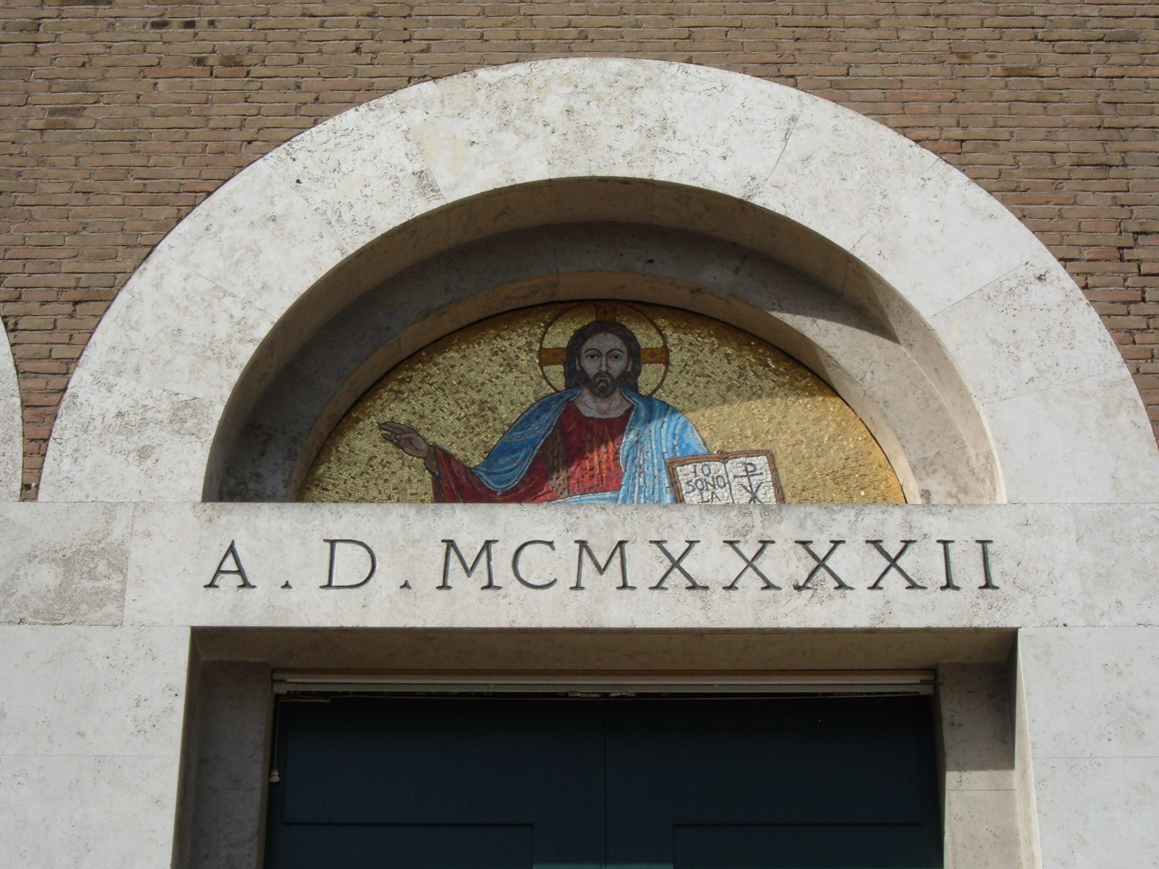 Chiesa di Santa Emerenziana, a Roma, nel quartiere Trieste.